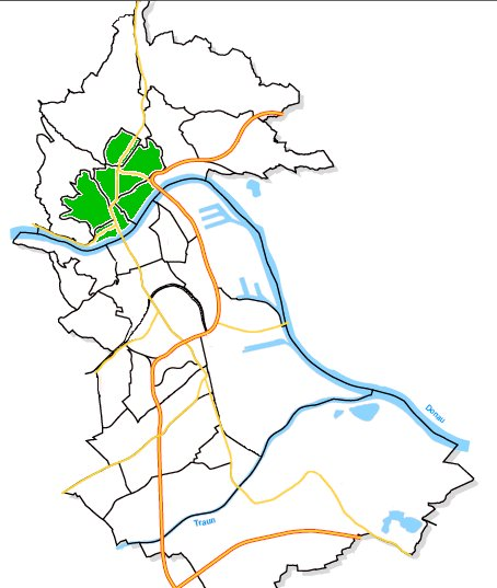 Städtische Bezirke Linz - Urfahr hervorgehoben. Selbst gezeichnet auf Grundlage von: "Stadtforschung Linz: Linz 2000. Fakten, Bilder, Grafiken."" (der greg:) 3.9.2005 - Lizenz: CC-BY